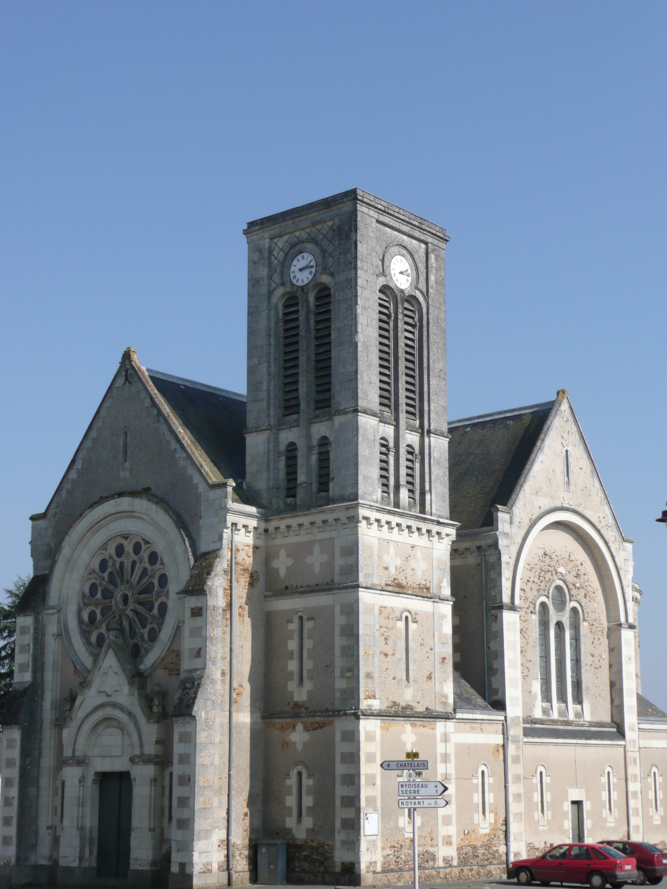 Eglise de Bouillé-Ménard